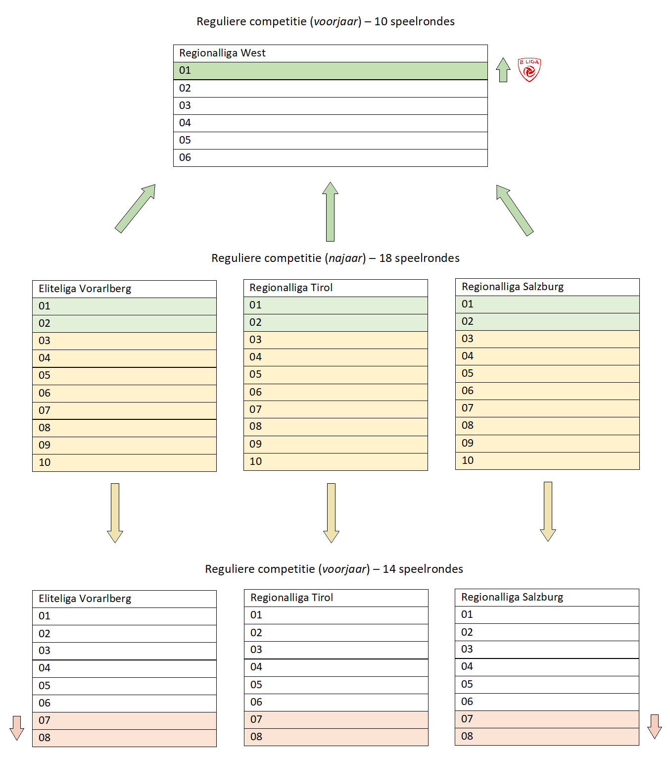 Competitie-opzet van de Regionalliga West/Eliteliga West in Oostenrijk vanaf het seizoen 2019/20.